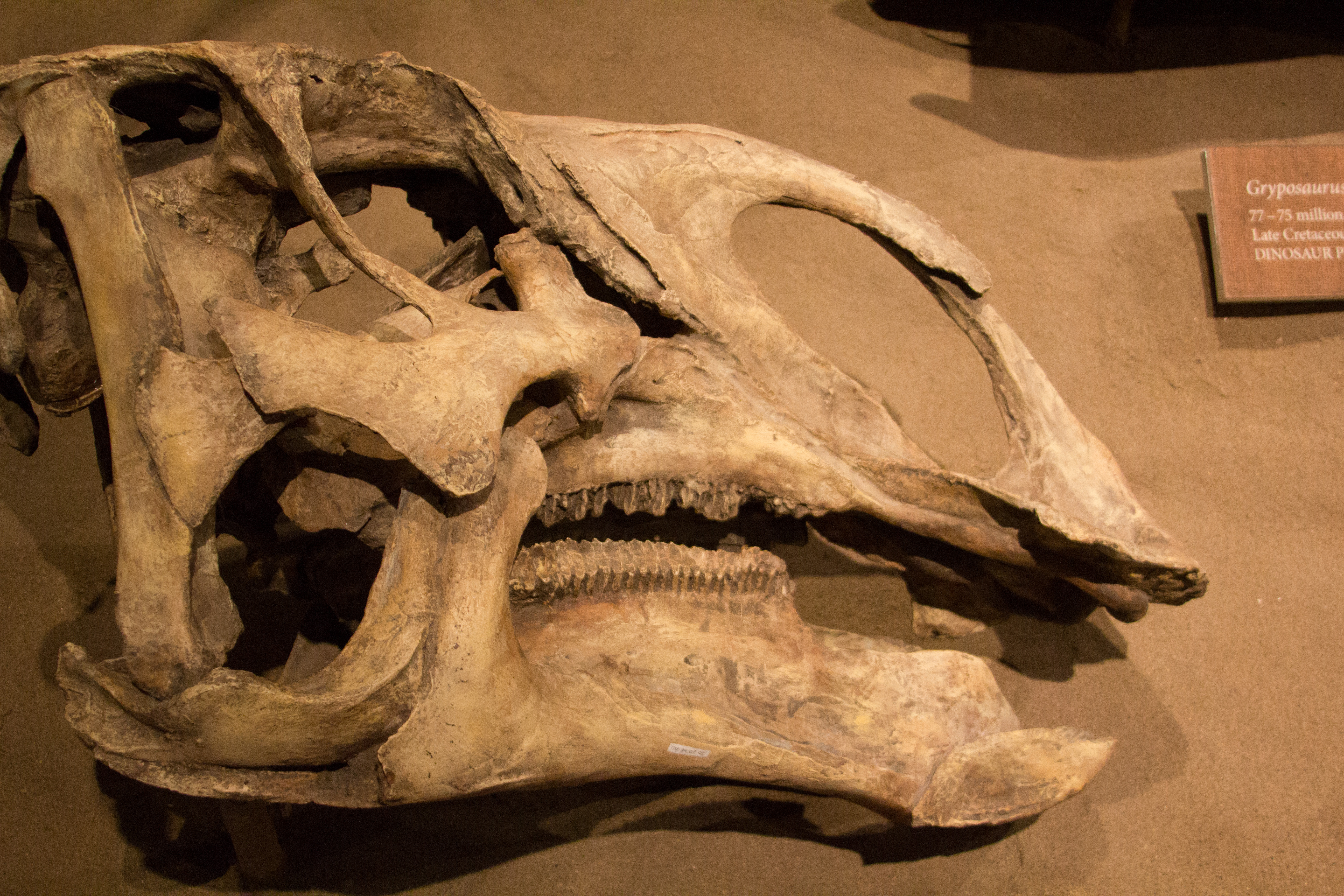 Brachylophosaurus skull.